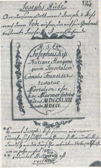 Српски (ћирилица): Јожеф Киш, Нацрт за епитаф из његовог споменара који се налази у Државној Сечењијевој библиотеци (Országos Szécsény Könyvtár) у Будимпешти.